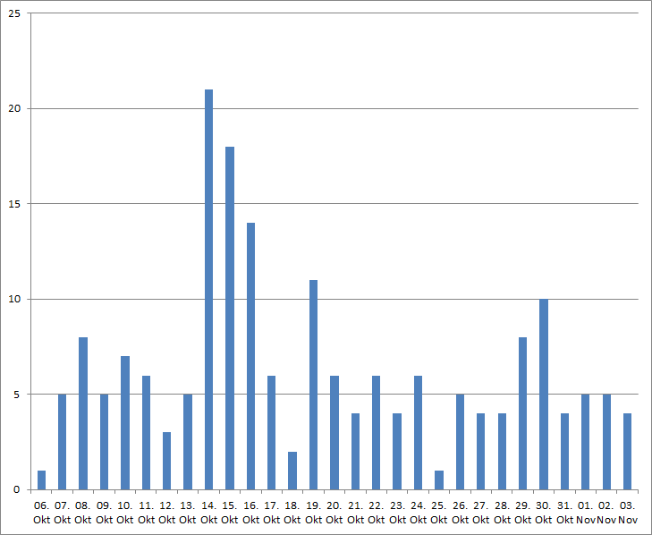 Luftschläge in und um Kobani 06.10.14 bis 16.10.14